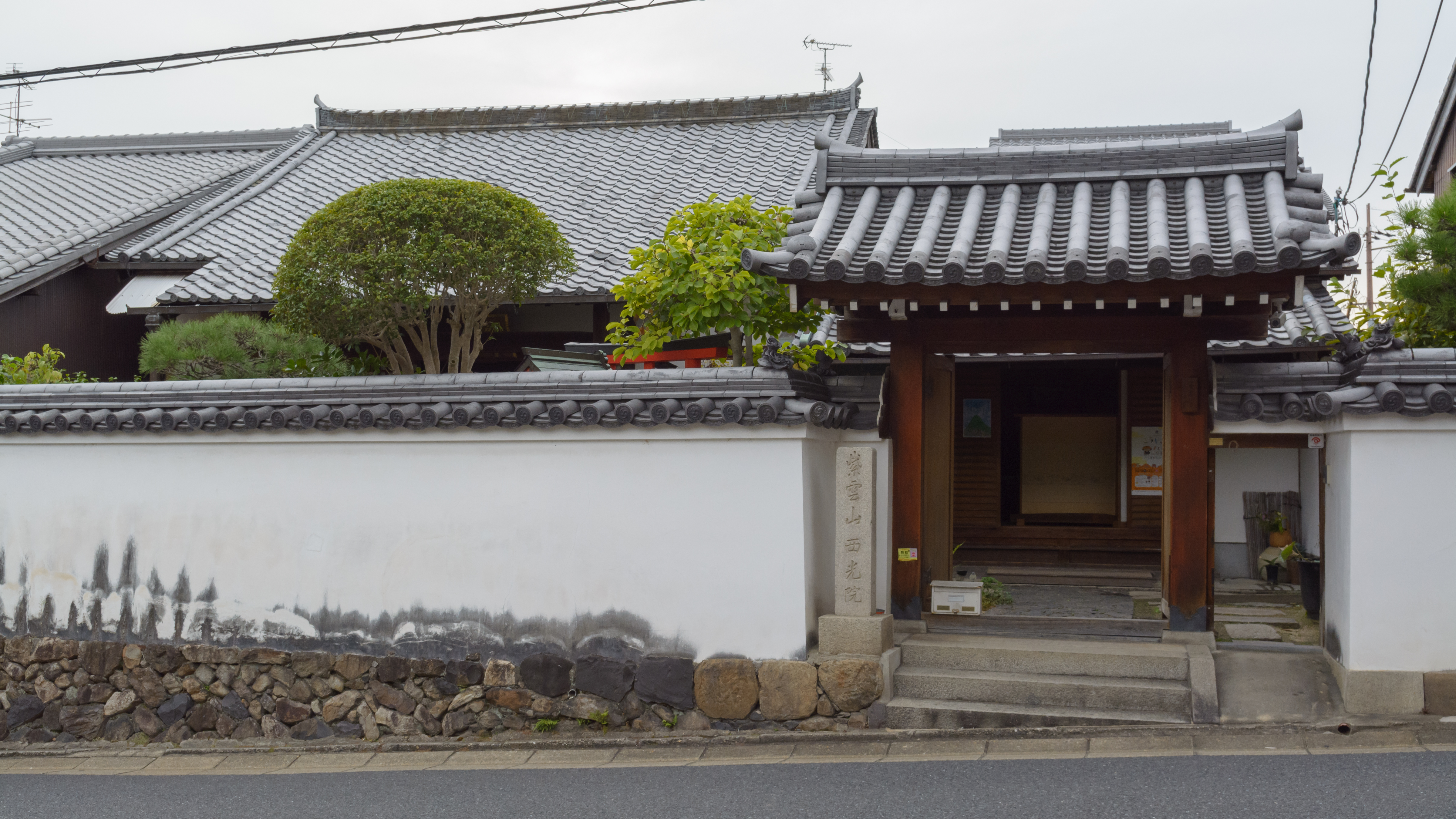 西光院（奈良市高御門町）